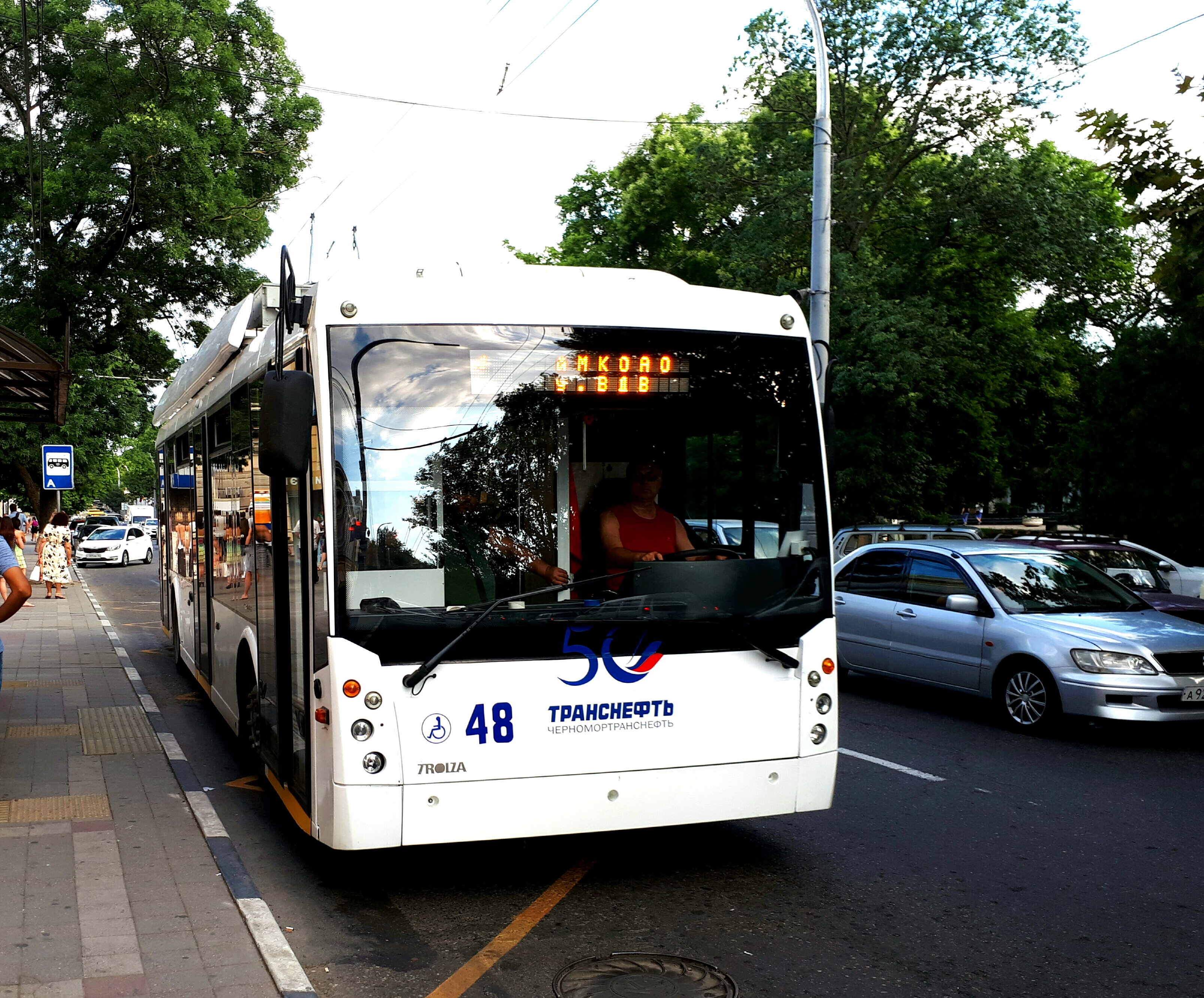 Троллейбус Тролза-5265.00 «Мегаполис» на ул. Советов, 03.08.2017